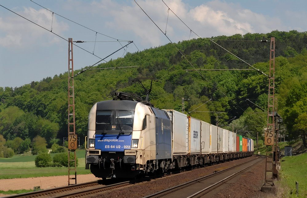 Dispolok ES6 U2-022 (vermietet an die Wiener Lokalbahn) bei Einbeck Salzd.